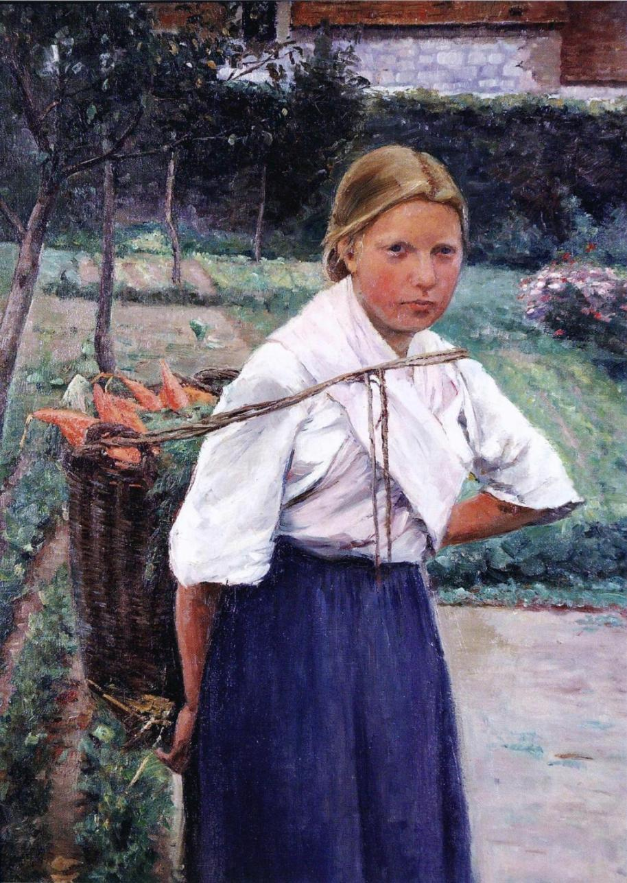 Ada Thilénin maalaus, kuuluu Hämeenlinnan taidemuseon Tytti Kurolan kokoelmaan.